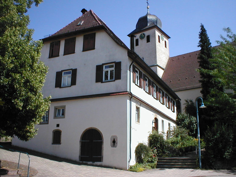 Pfarrhaus in Untergruppenbach-Unterheinriet